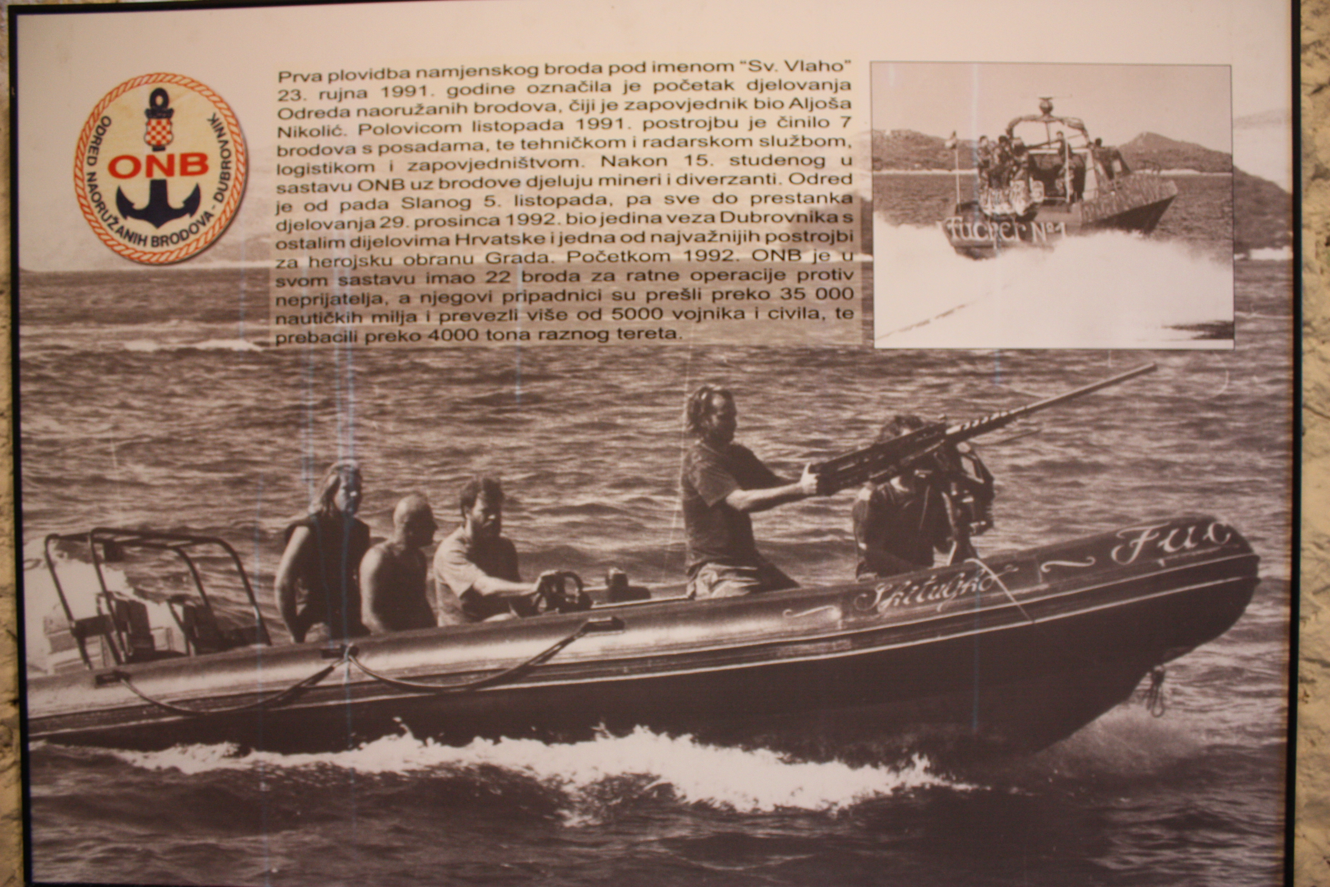 Pripadnici odreda naoružanih brodova na izvršavanju postavljenih zadaća (iz Muzeja Domovinskog rata - Dubrovnik)